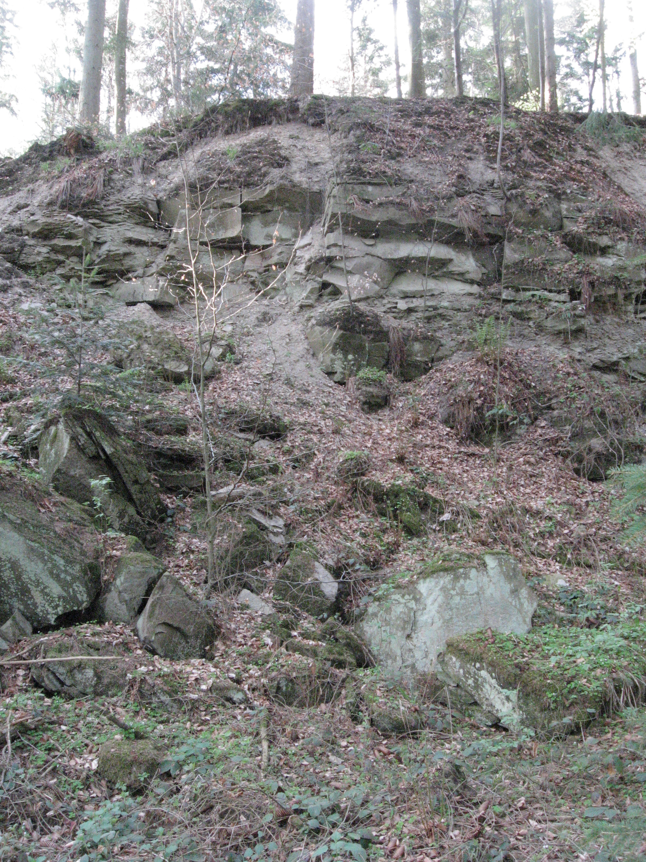 Alter Schilfsandsteinbruch auf halber Höhe am Nordhang der vom Schenkenbach durchflossenen Mörterklinge etwa 0,7 km WSW von Frankenhardt-Birkhof.